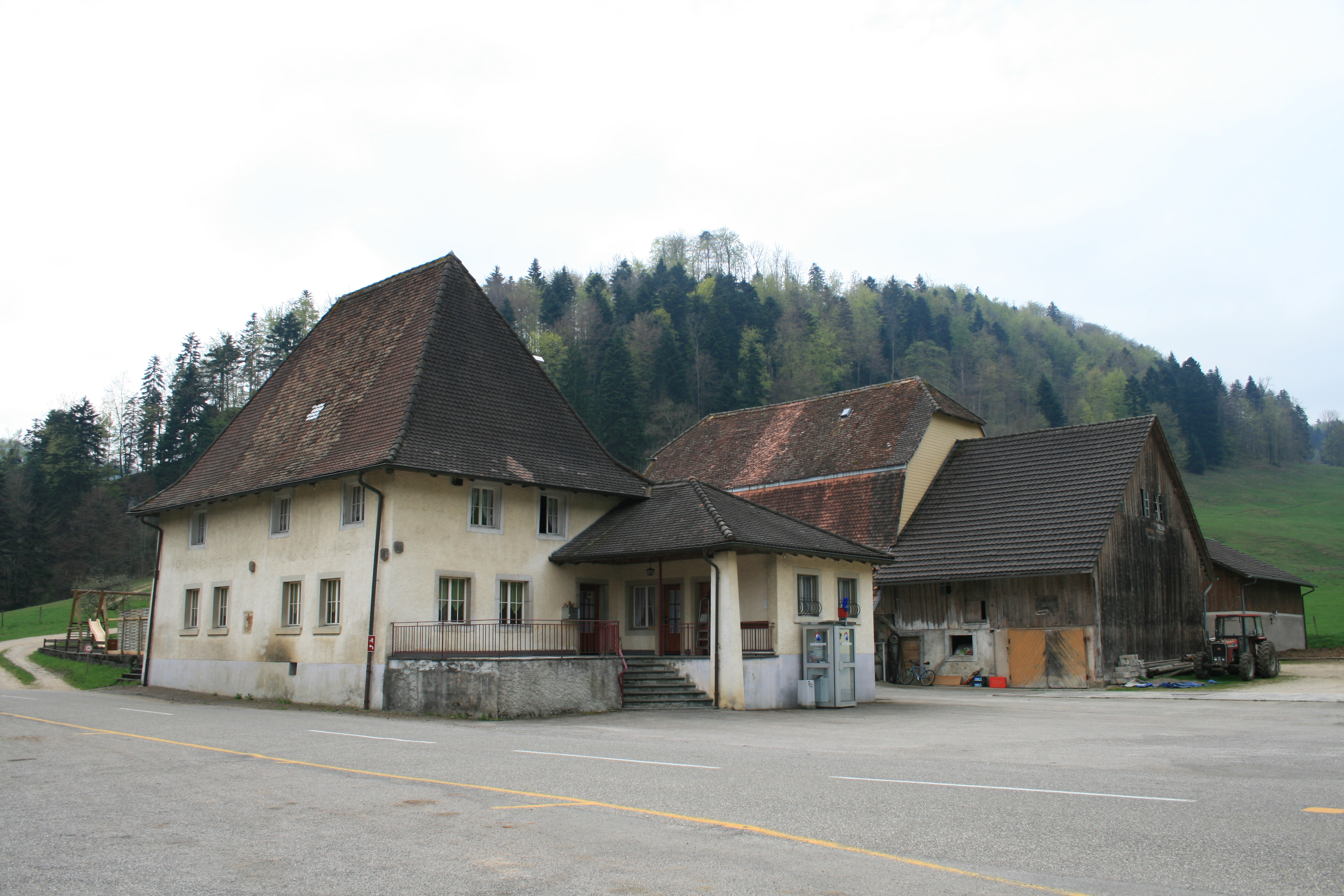 Ehemaliges Restaurant, Bauernhof mit Wirtschaftsgebäuden, Lucelle JU